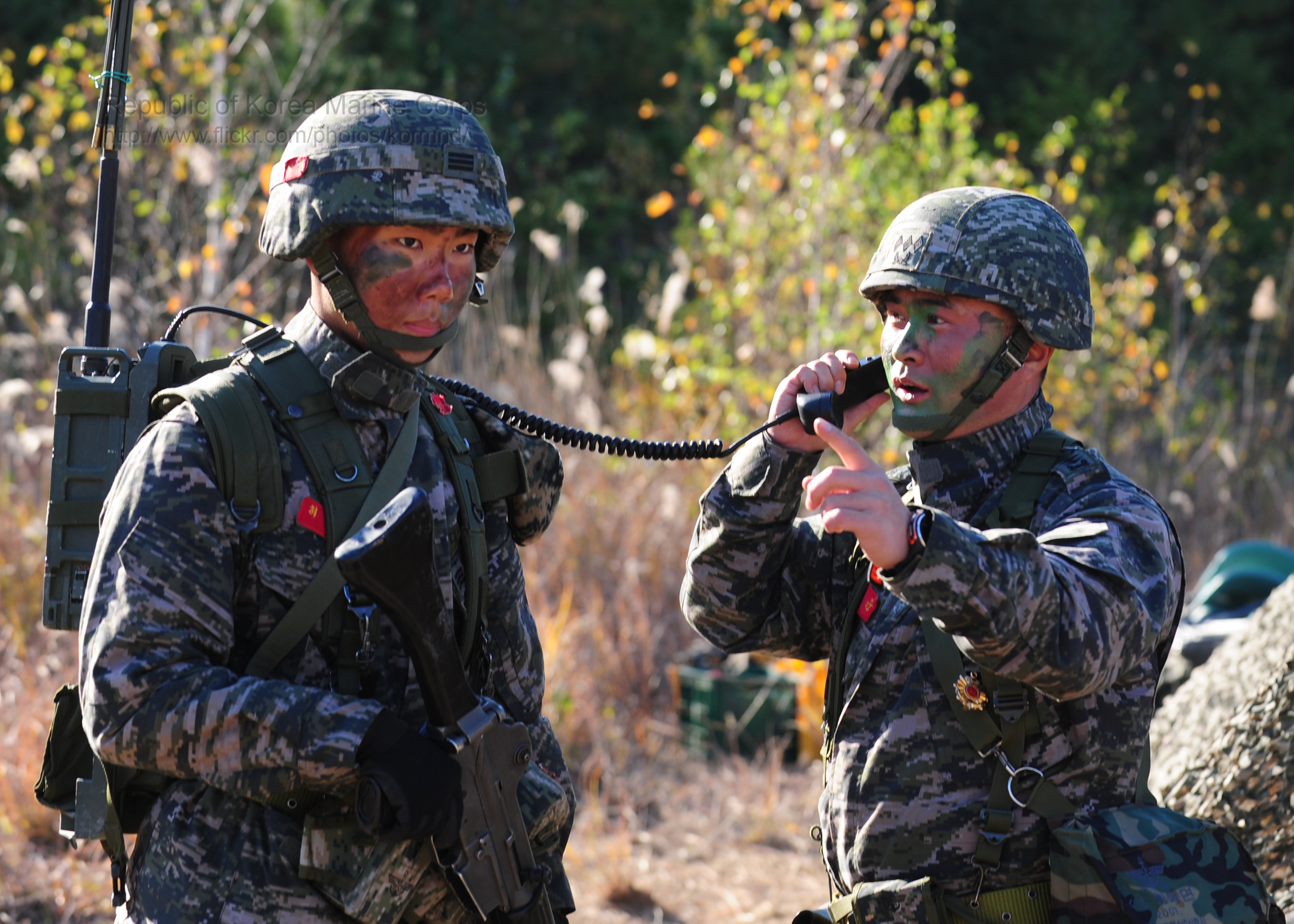 해병대 제1사단 정통대대는 경북 포항시 독석리 일대에서 통신망 구성을 통한 대대전술훈련을 실시했다. 사진 - 중사 조정민